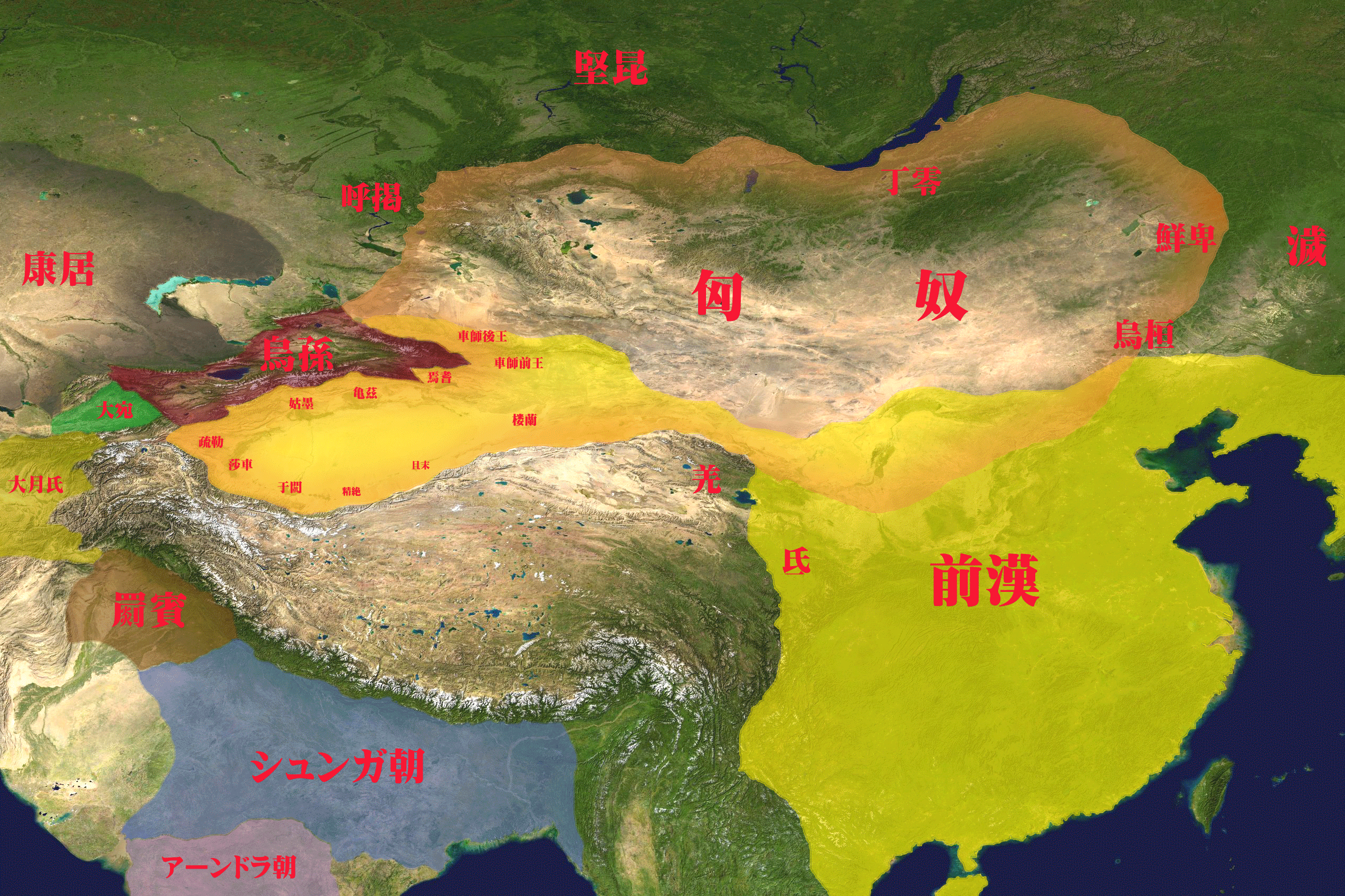 紀元前2世紀頃の匈奴とその周辺国。